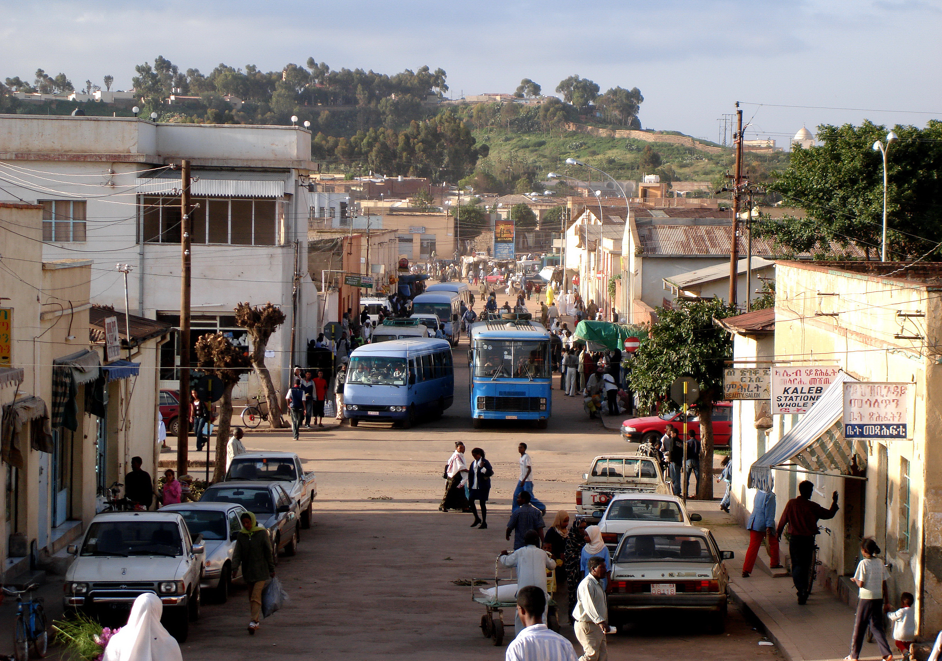 Asmara, (Eritrea)